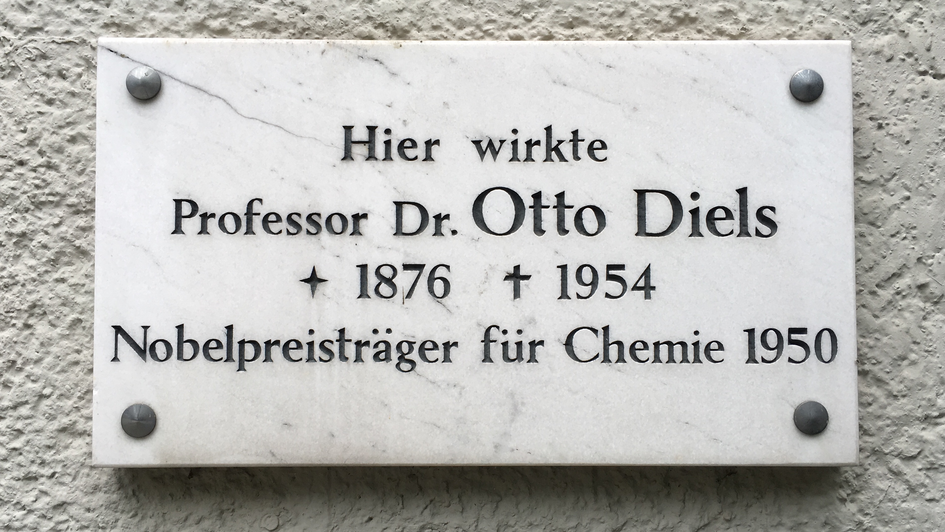 Gedenktafel des Chemikers Otto Diels am Medizinaluntersuchungsamt und Krankenhaushygiene vom Universitätsklinikum Schleswig-Holstein in der Brunswiker Straße 4 in Kiel